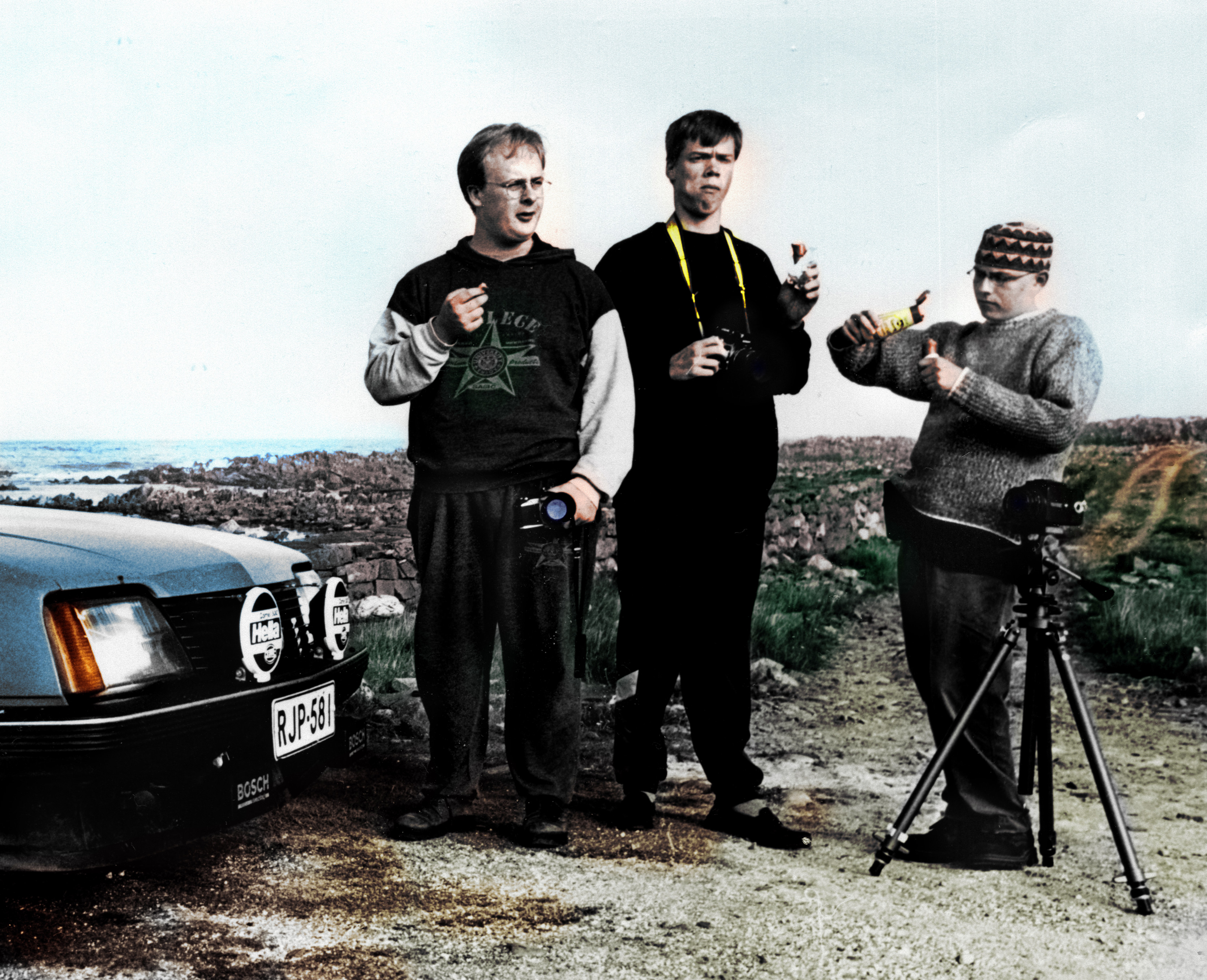 Ville Savolainen, Tatu Kosonen ja Tommi Kähärä Hamningberissä, Norjassa 1998